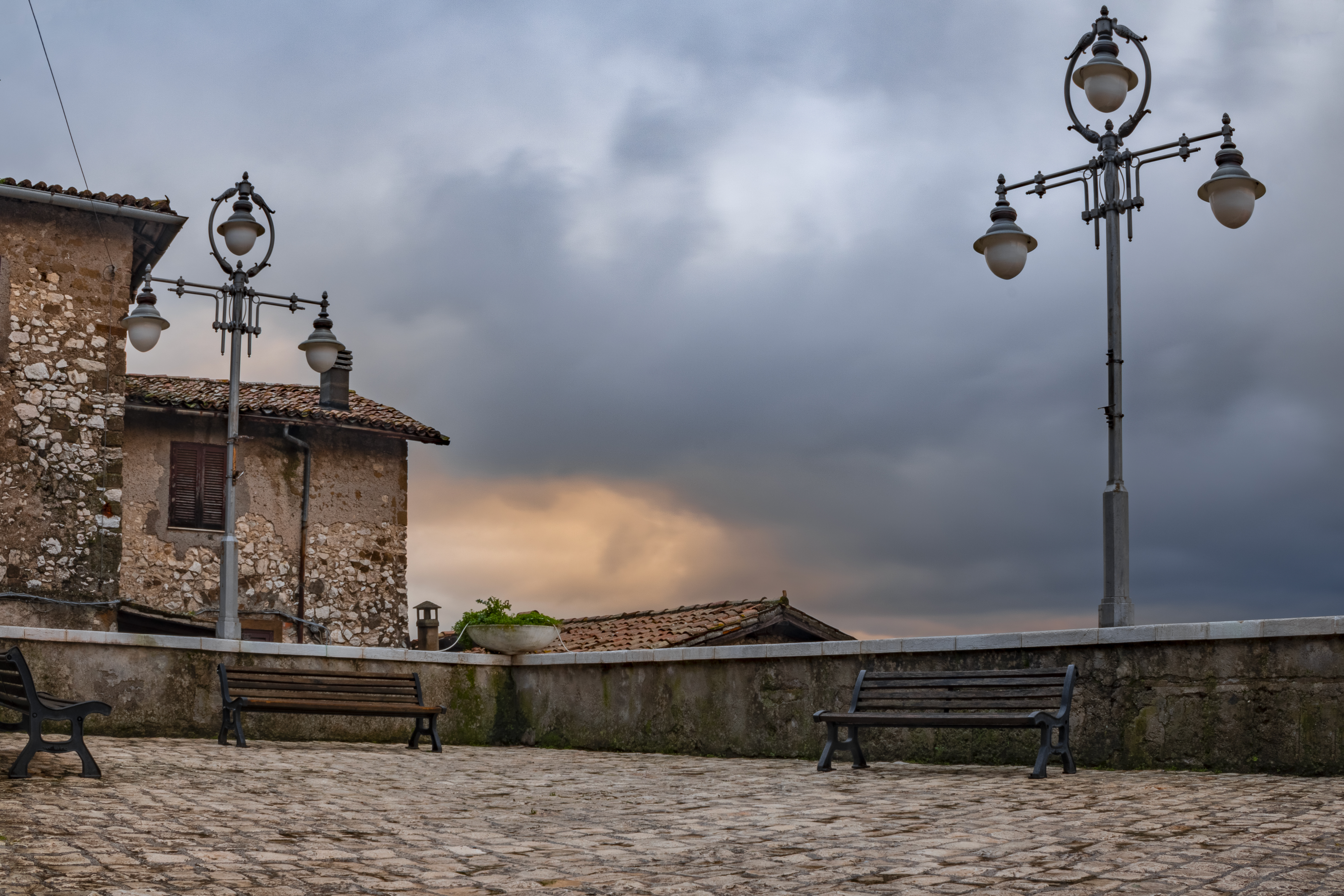 Piazza della resistenza. Posta nella parte superiore del borgo di Artena. Foto di Christian Evangelista